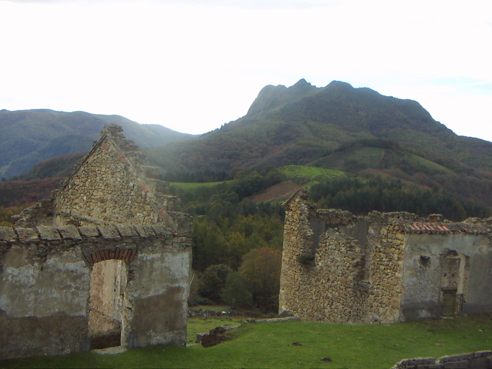 Military bunkhouses made by Franco's forces in the 40's. Behind them, the mountain peak called Aiako Harria.